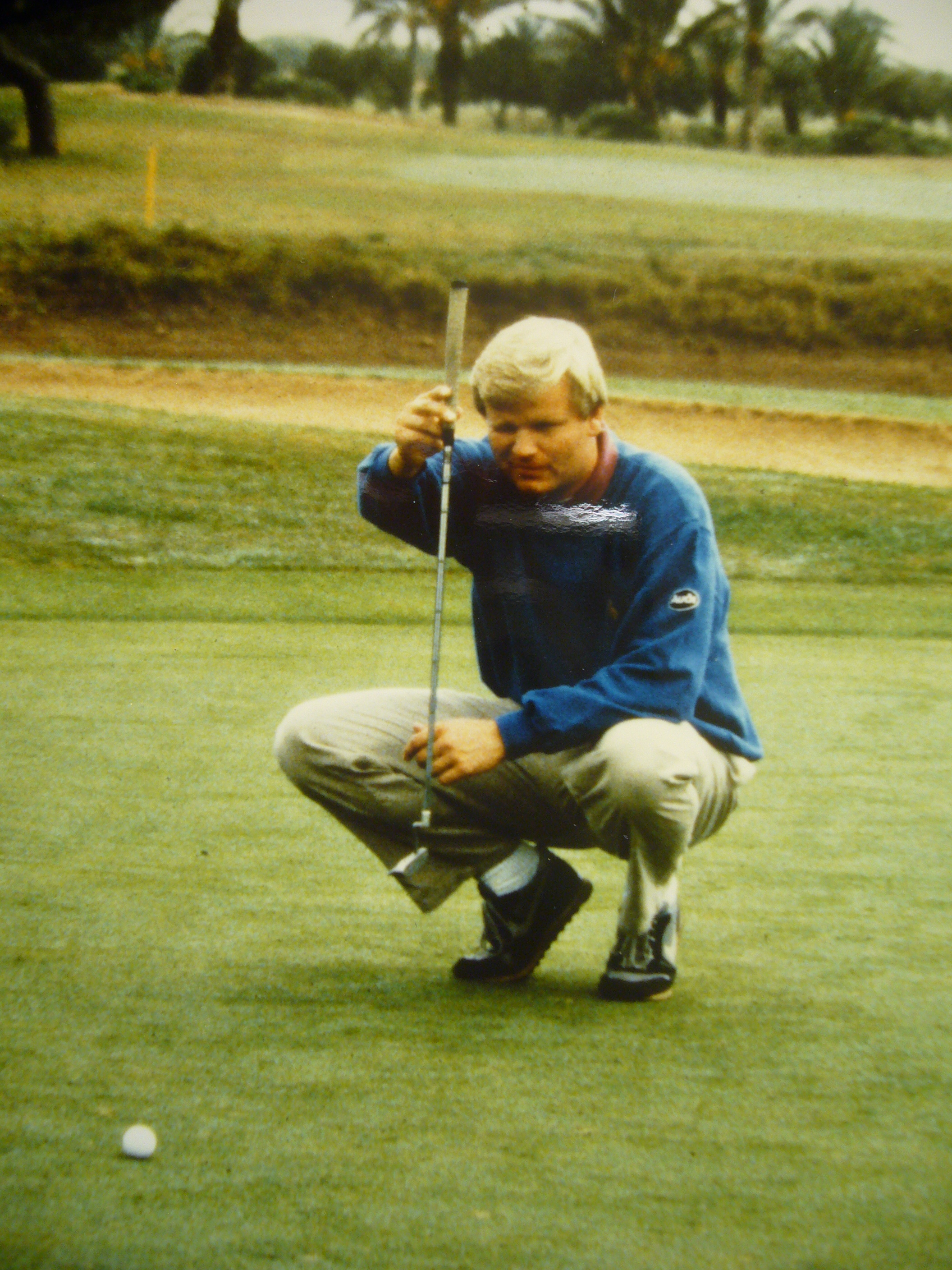 Heinz Peter Thuel, winner Tourschool 1989